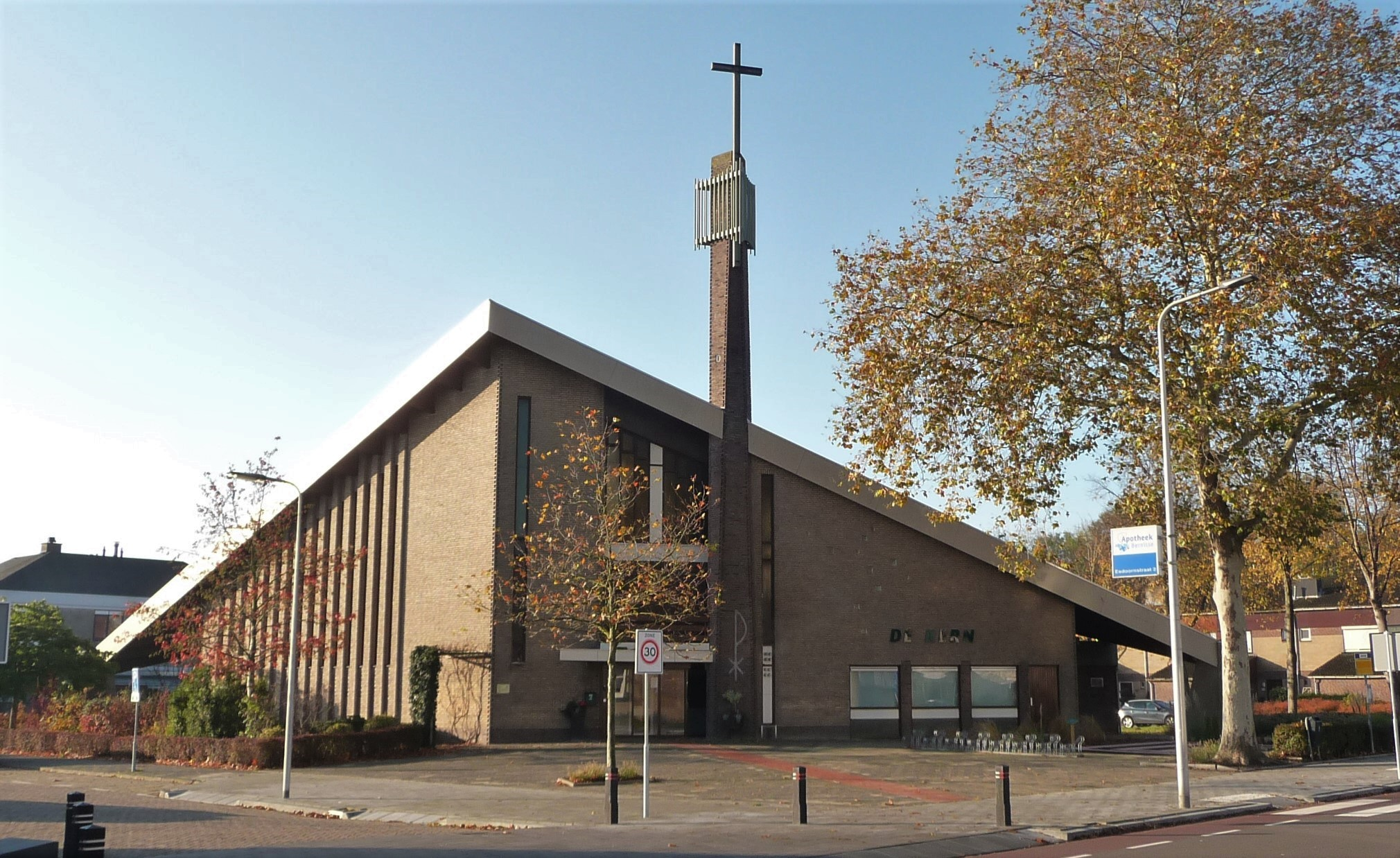 Protestants-Christelijke kerk De Kern Spijkenisse, Eikenlaan 2